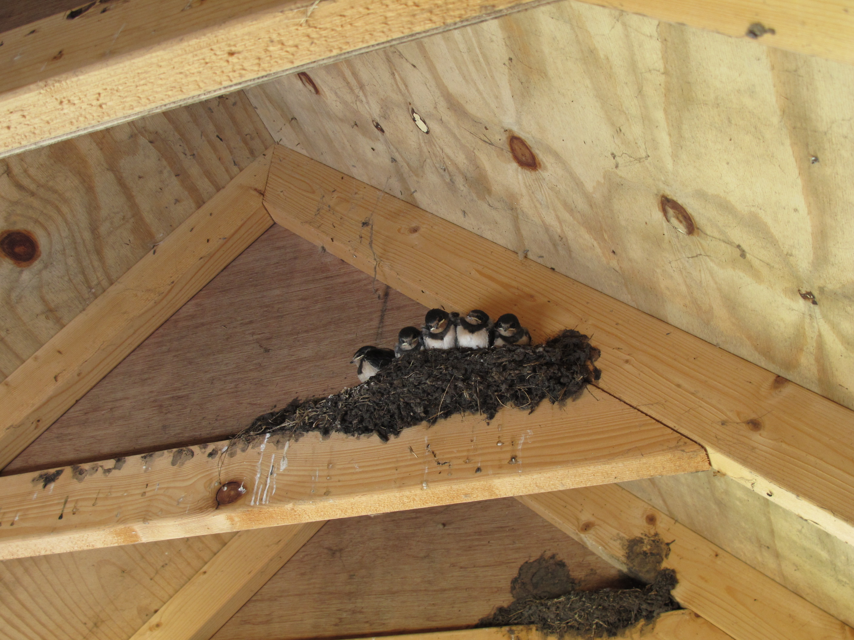 In de vogelkijkhut heeft de boerenzwaluw zijn nest gemaakt This is a photo or sound file made in De Alde Feanen National Park in the Netherlands, with the main subject of the file in the category: animals